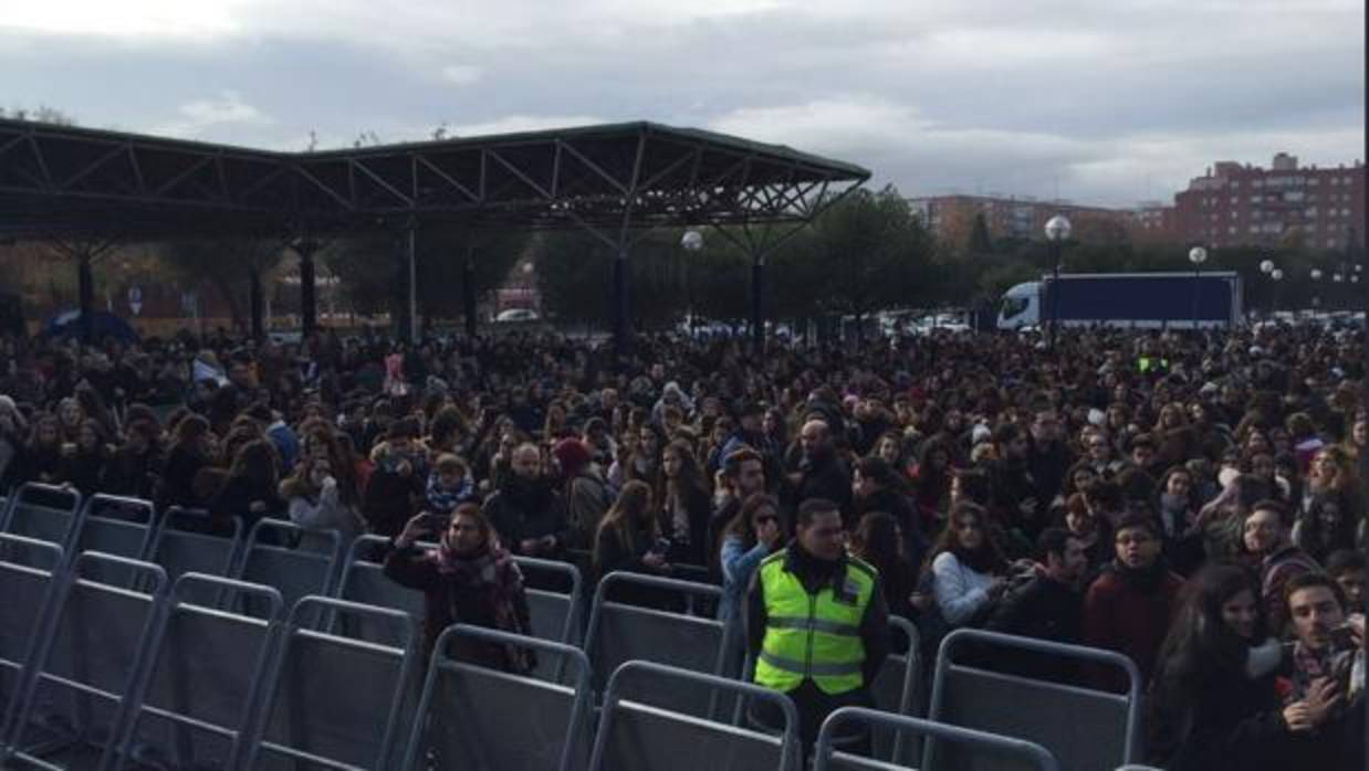 Bany de messes a la firma de discos d'OT